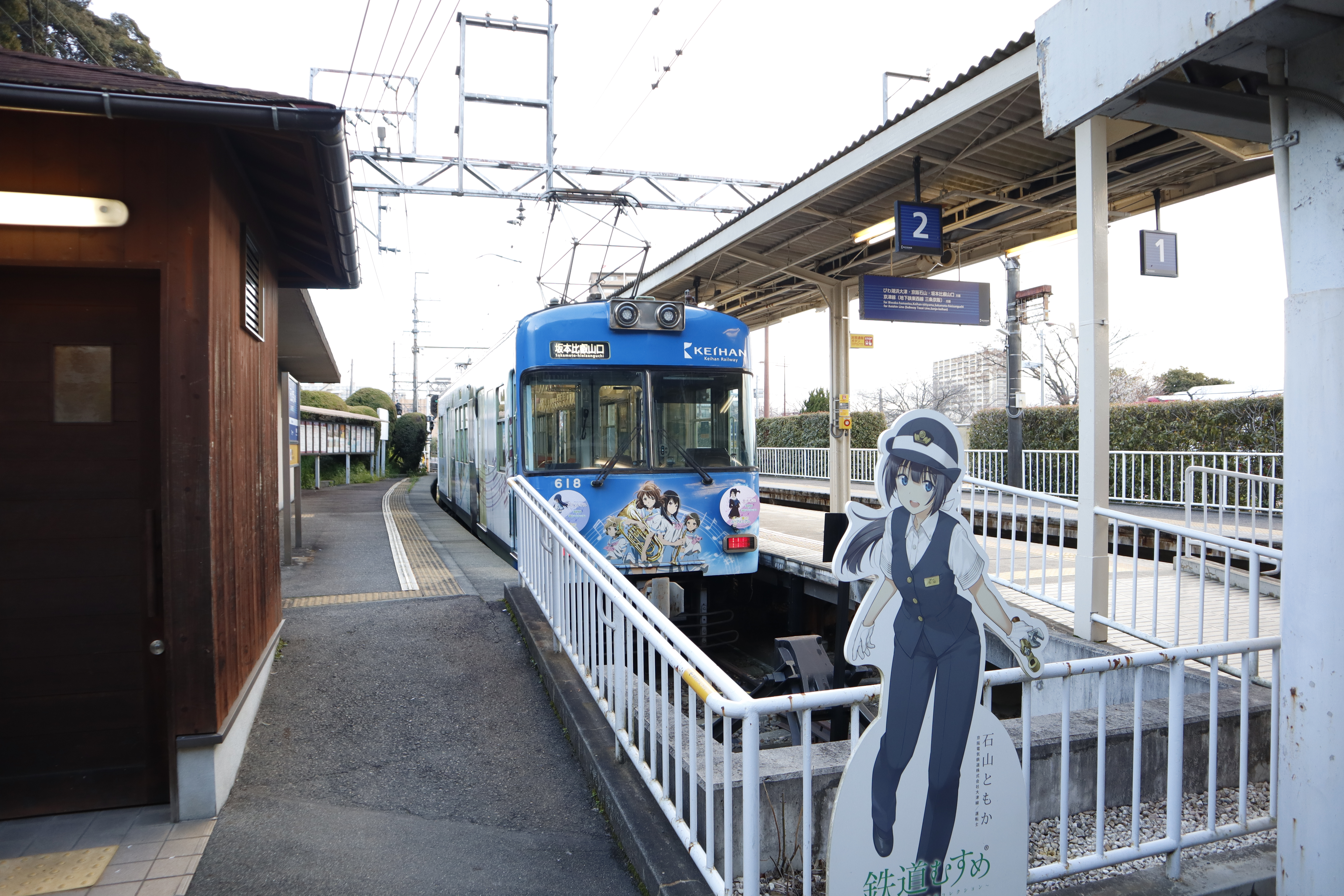 石山寺駅のホーム